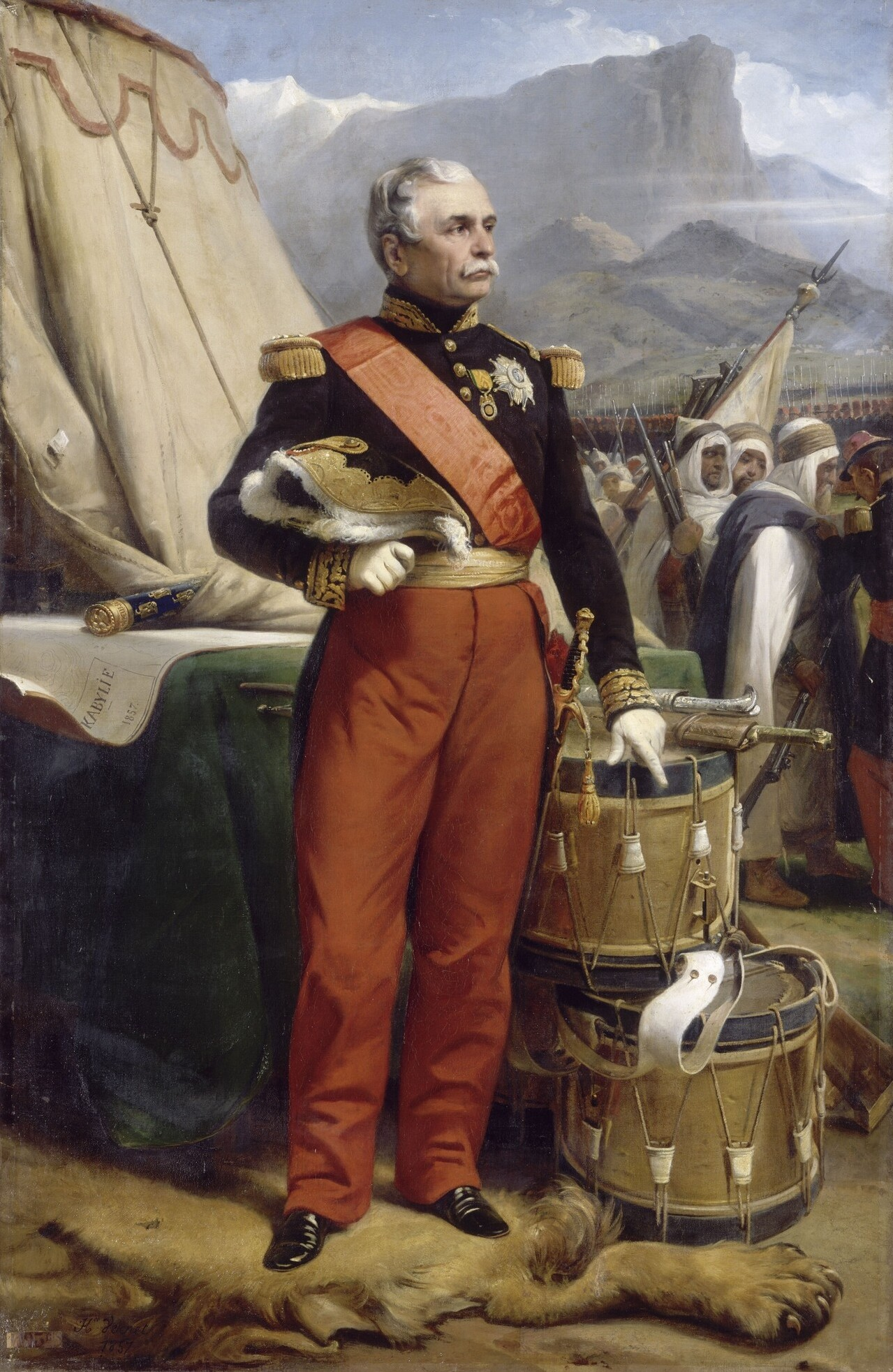 Jacques-Louis-César-Alexandre, comte de Randon, maréchal de France. Tableau illustrant les victoires de ce militaire en Kabylie en 1857.